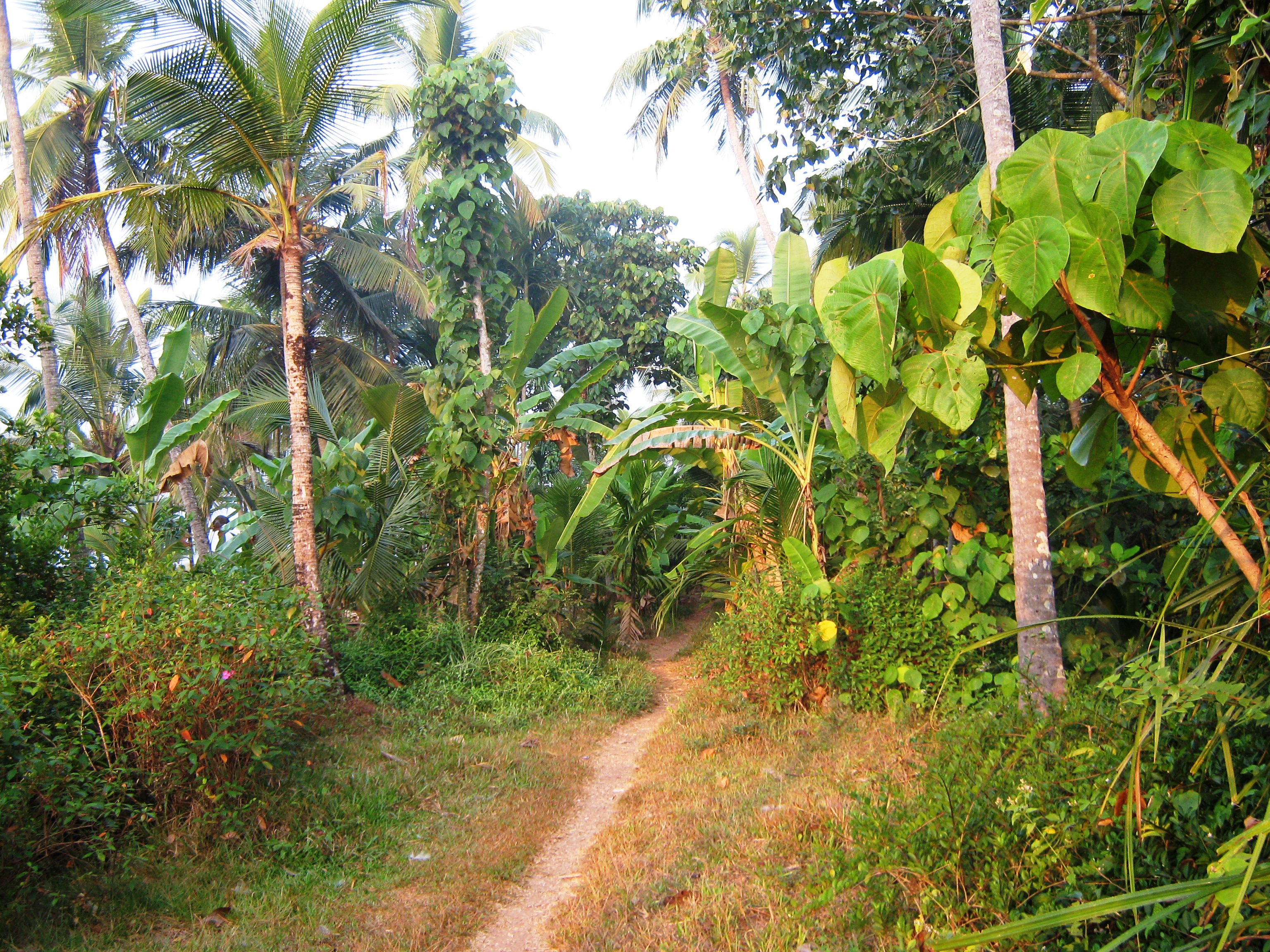 Munderimotta, Kannu, Kerala, India.